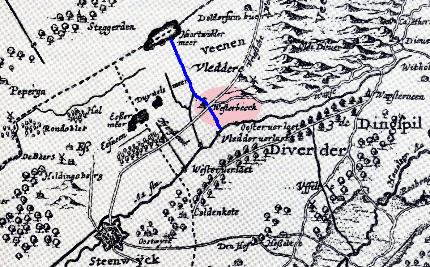 Oude kaart van Drenthe uit 1634 (fragment) - plaats van het 1e huis Westerbeek en de gegraven vaart Westerbeeksloot zijn door mij (Gouwenaar) ingekleurd